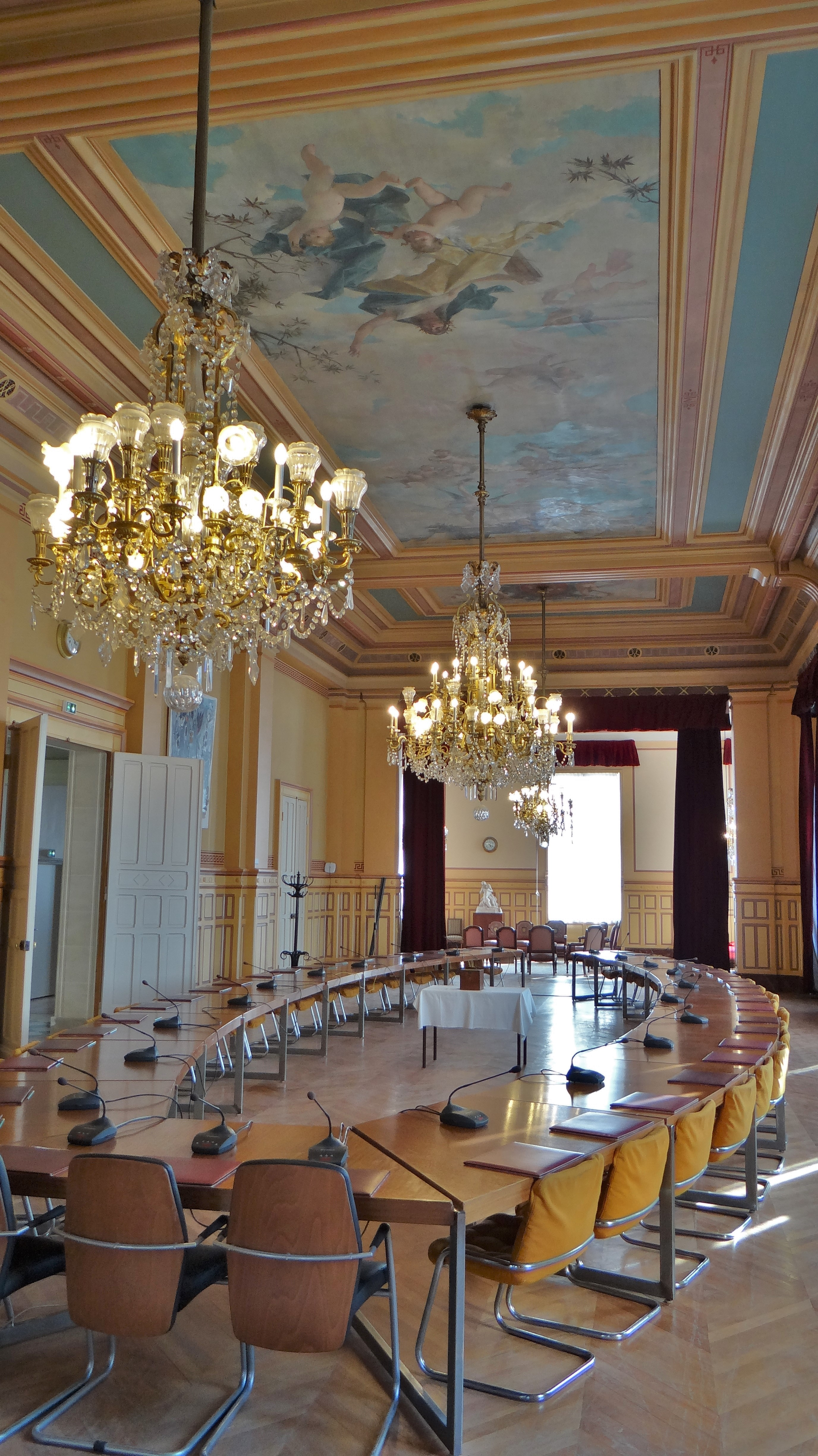 Salle du Conseil municipal, Hôtel de Ville de Montrouge